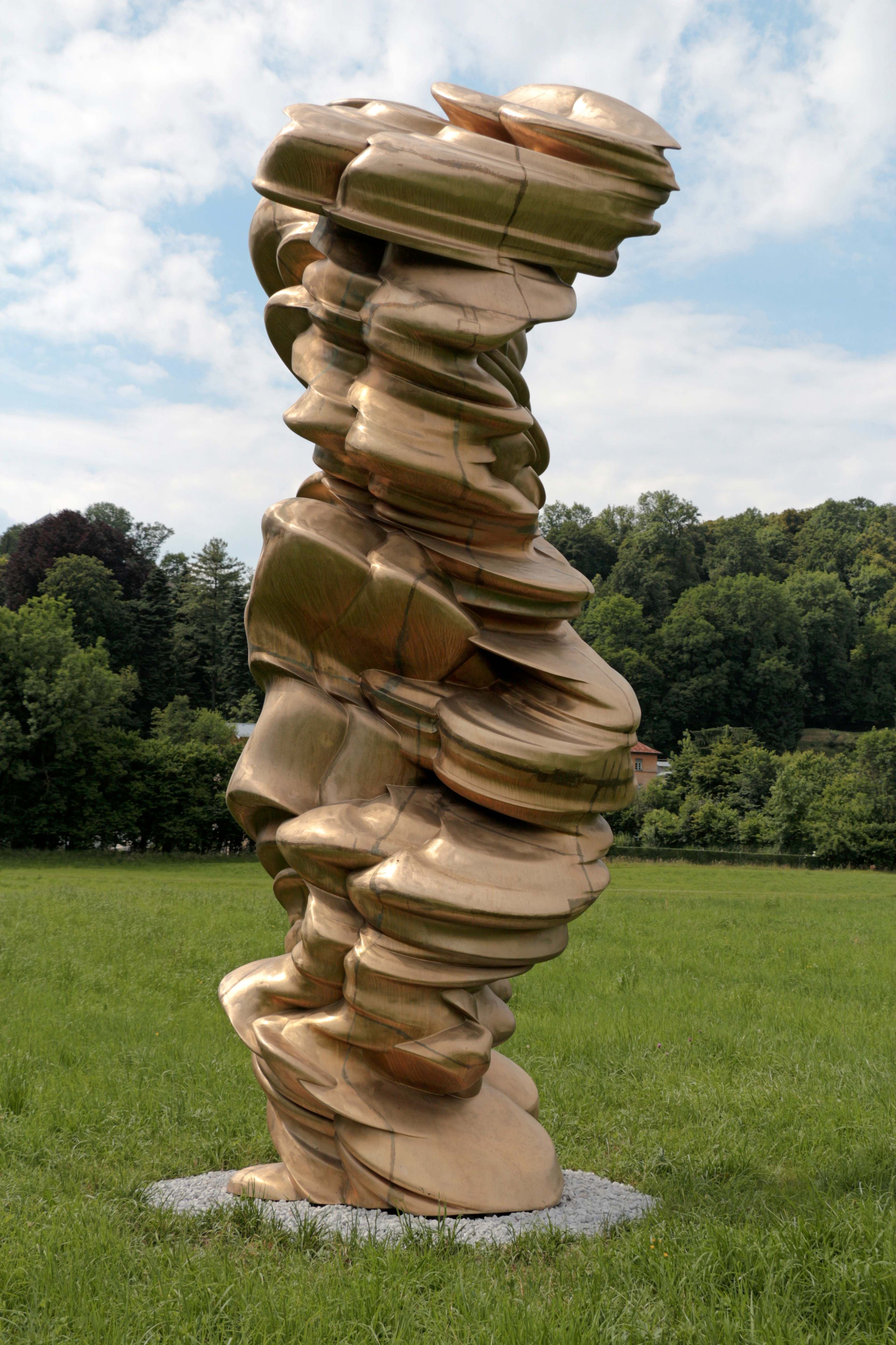 Anthony (Tony) Cragg: Mixed Feelings, Salzburg 2014